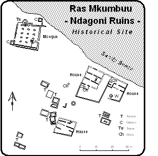 Map of Ndagoni Ruins at Ras Mkumbuu, Pemba, Tanzania